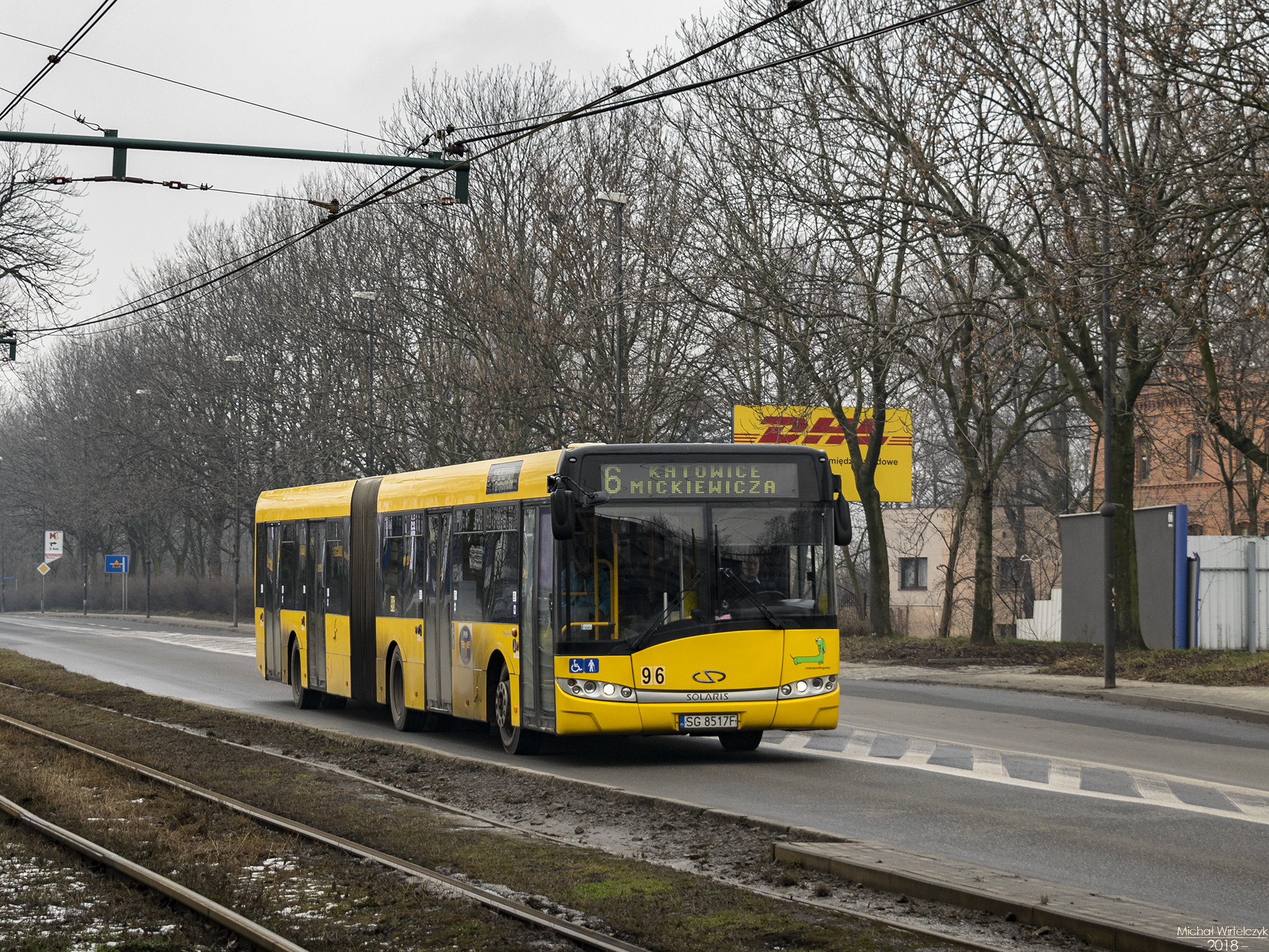 Zabrze - Maciejów, ul. Wolności. Solaris Urbino 18 należący do Przedsiębiorstwa Komunikacji Miejskiej w Gliwicach podczas obsługi linii 6 relacji Gliwice Plac Piastów - Katowice Mickiewicza.